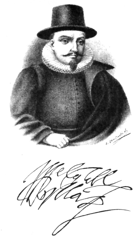 Fernando Torres y Portugal, Conde de Villardompardo y Escañuela, VII Virrey del Perú (1585 - 1589).